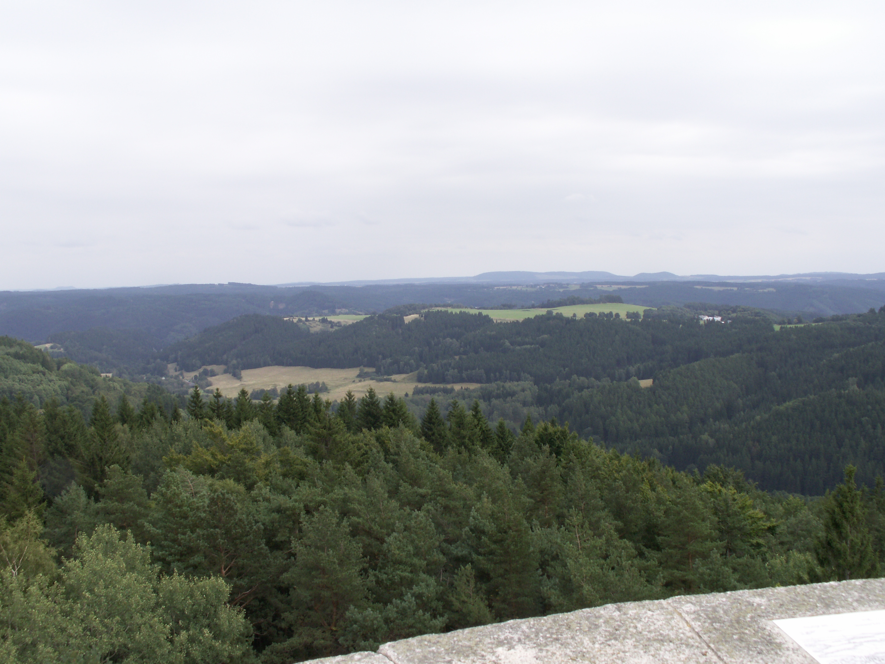 výhled z rozhledny Krásenský vrch, okres Sokolov